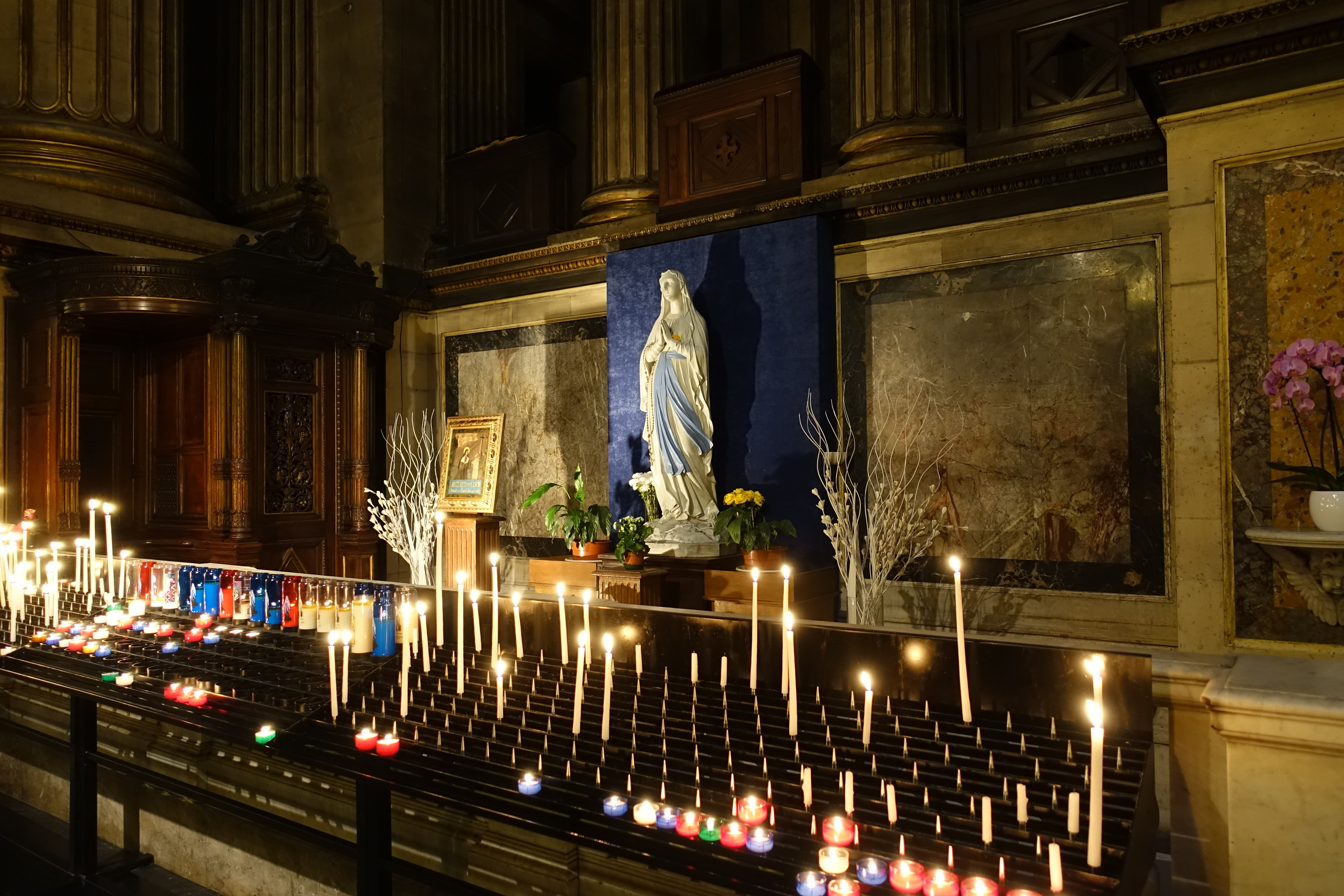 Eglise de la Madeleine @ Paris Église de la Madeleine, Place de la Madeleine, 75008 Paris, France.